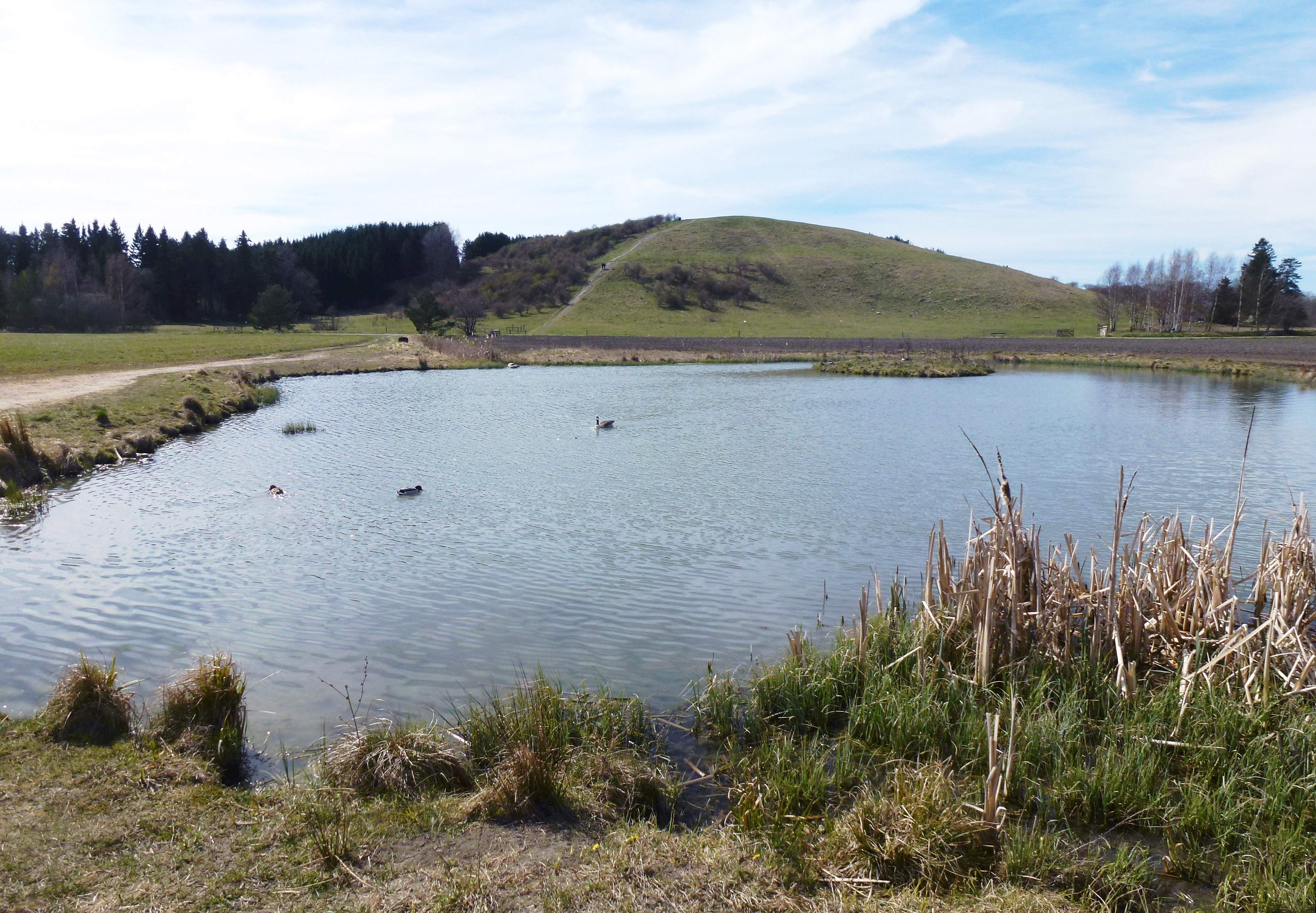 Igelbäckens kulturreservat, Granholmstoppen och Hästa damm